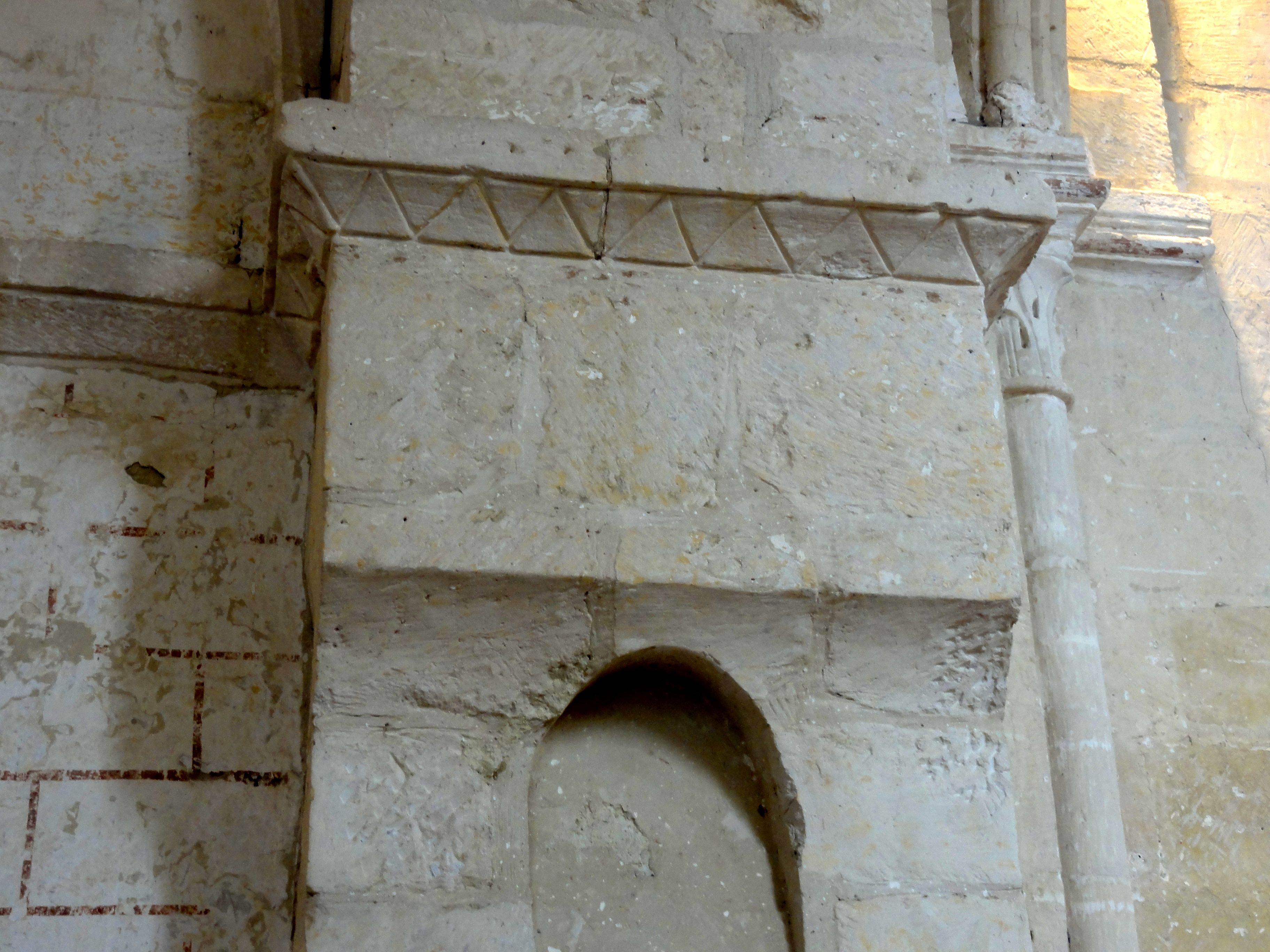 Arc triomphal, console côté nord.